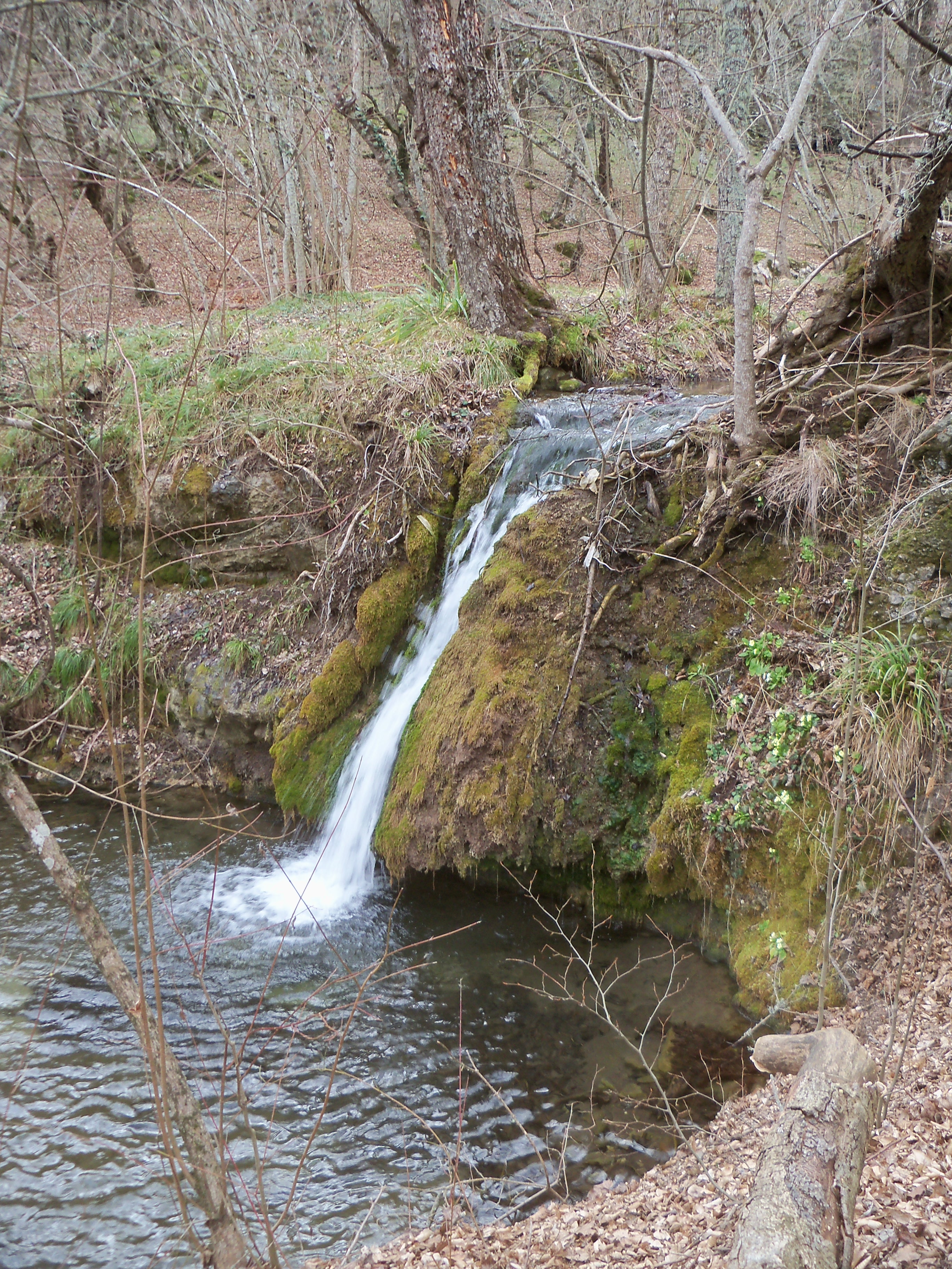 Фото